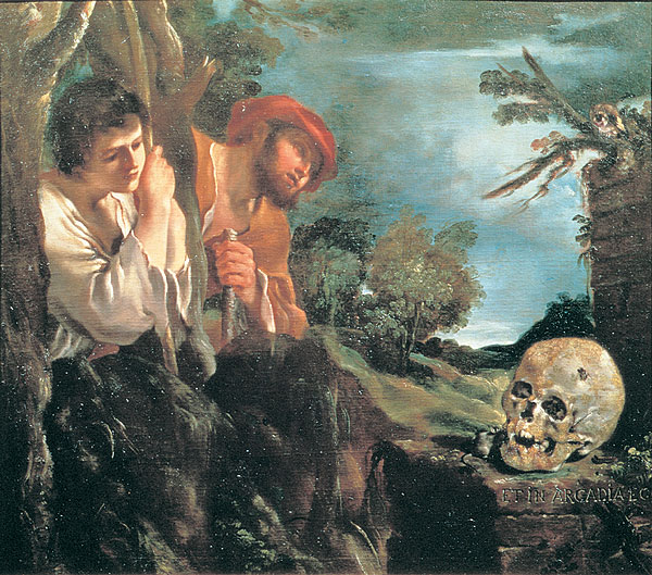 detail